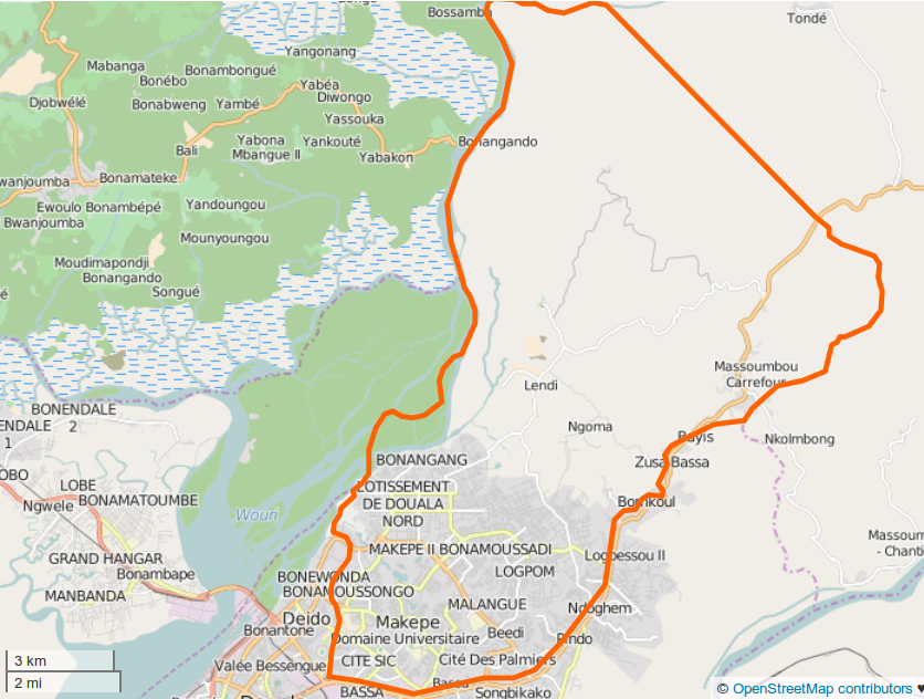 Limites communales de Kotto, Douala V. OSM. This map may be incomplete, and may contain errors. Don't rely solely on it for navigation.